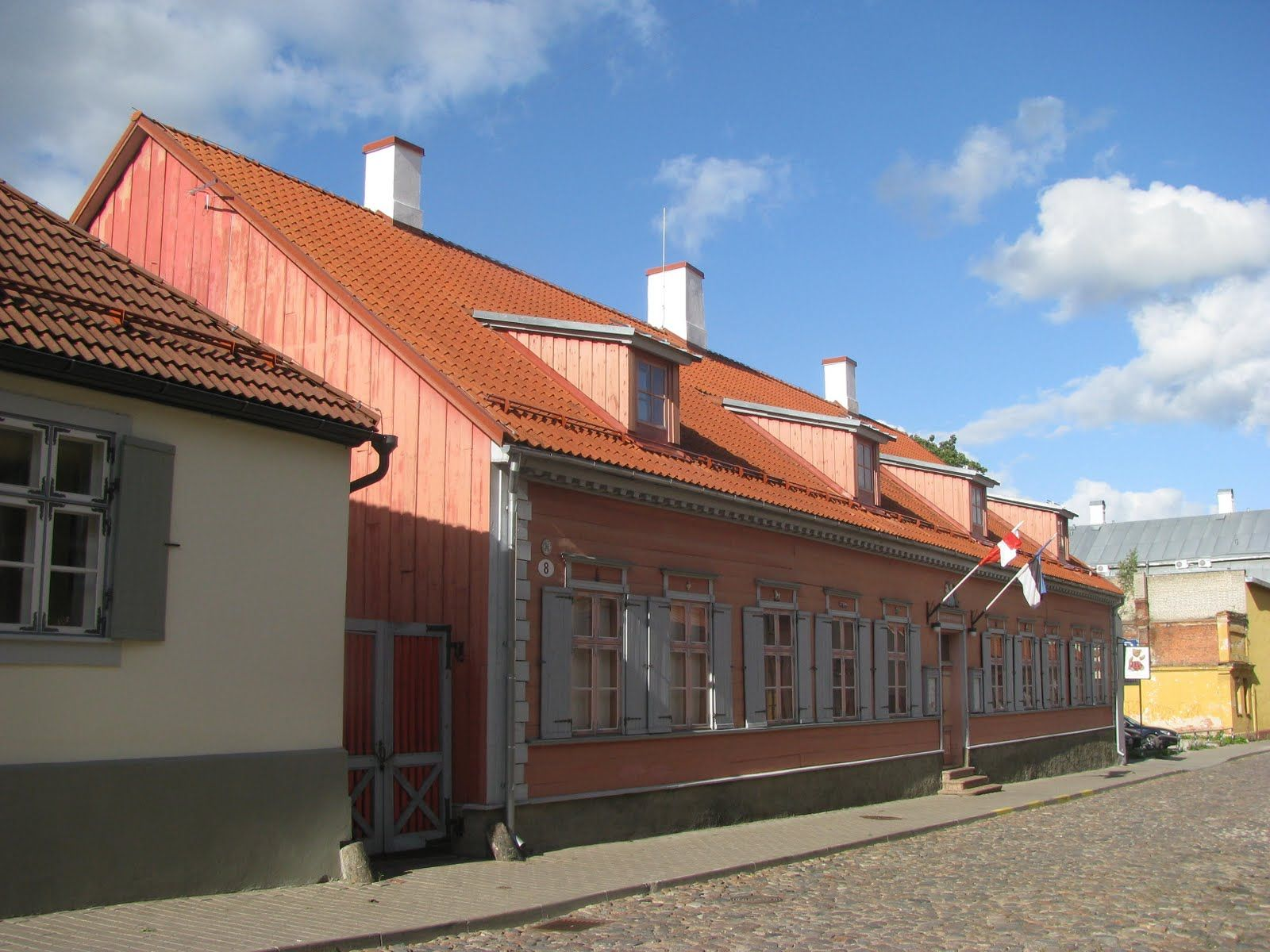 Tartu mänguasjamuuseumi hoone Lutsu tänav 8, 19. sajand